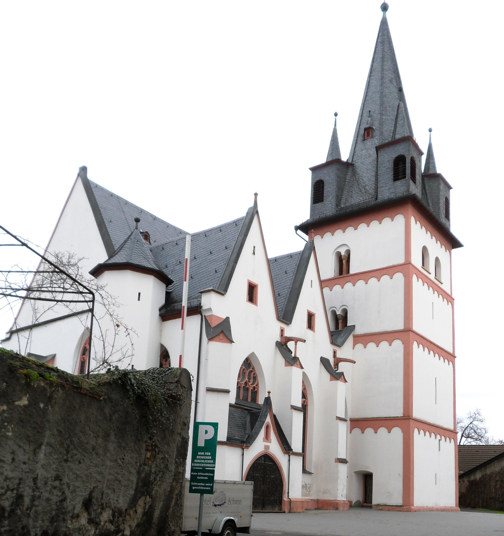 Blick von Südwesten auf die katholische Pfarrkirche St. Martin in Oestrich. Sie wurde 1508 erbaut und 1635 im Dreißigjährigen Krieg niedergebrannt. Der Wiederaufbau zog sich bis 1893 hin, als Pfarrer Rody die Restauration im spätgotischen Stil abschloss. Zu dieser Zeit wurden die Innengewölbe wieder eingezogen, die Sakristei erweitert und eine Marienkapelle und eine Beichtkapelle angebaut. An Stelle dieser Kirche ließ vermutlich Rabanus Maurus um 850, ebenfalls St. Martin geweiht, eine erste Kirche und damit die wohl alteste Pfarrei im Rheingau errichten.